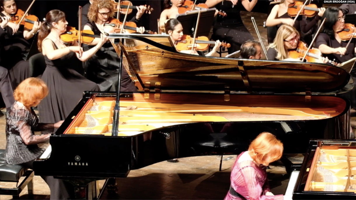 Pekinel kardeşler 18. Mersin Uluslararası Müzik Festivali'nde Mozart'ın 10. Piyano Konçertosu permonmansını sergiliyor.